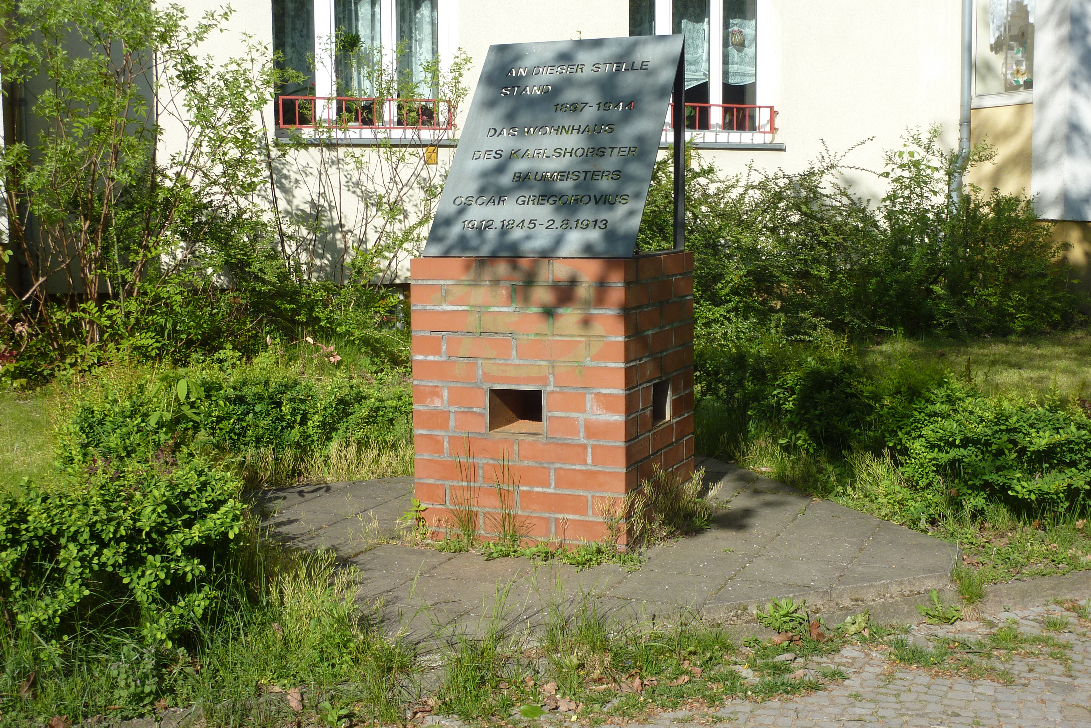 Metallene Gedenktafel auf gemauertem Sockel, Ehrlichstraße Ecke Wildensteiner Straße in Berlin-Karlshorst. AN DIESER STELLE STAND 1897–1944 DAS WOHNHAUS DES KARLSHORSTER BAUMEISTERS OSCAR GREGOROVIUS 19.12.1845–2.8.1913